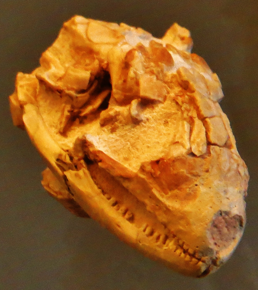 Fossil - Took the picture at Museum of Paleontology, Zurich